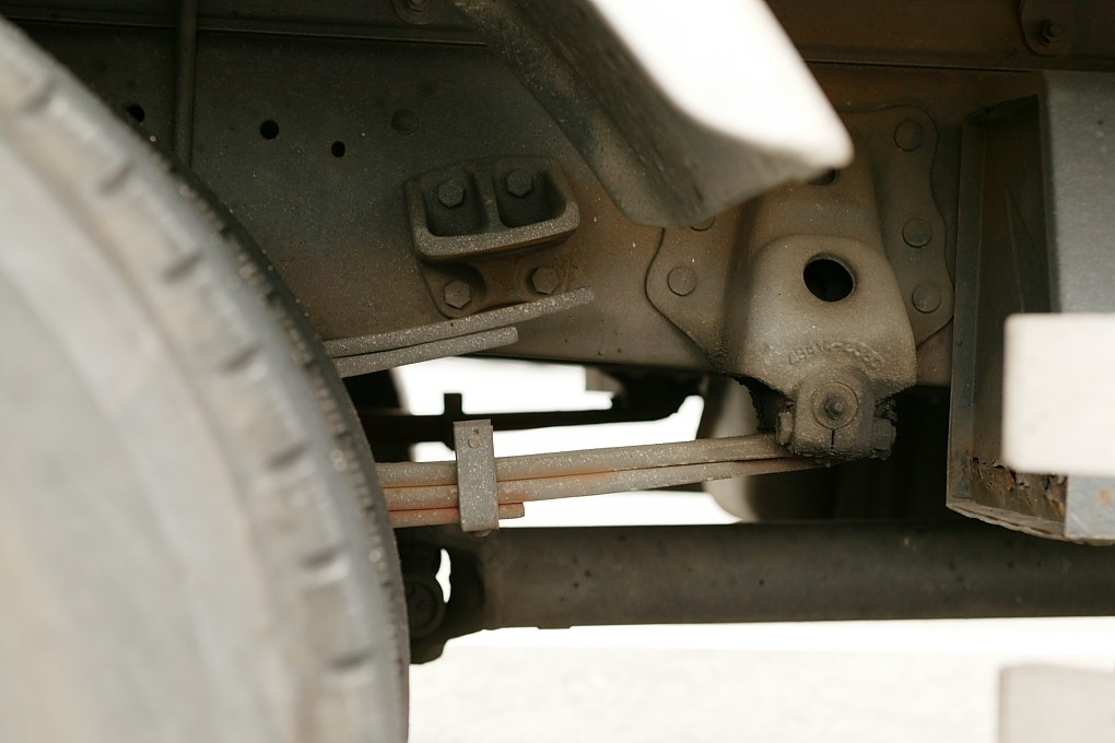 Master and helper leaf springs.